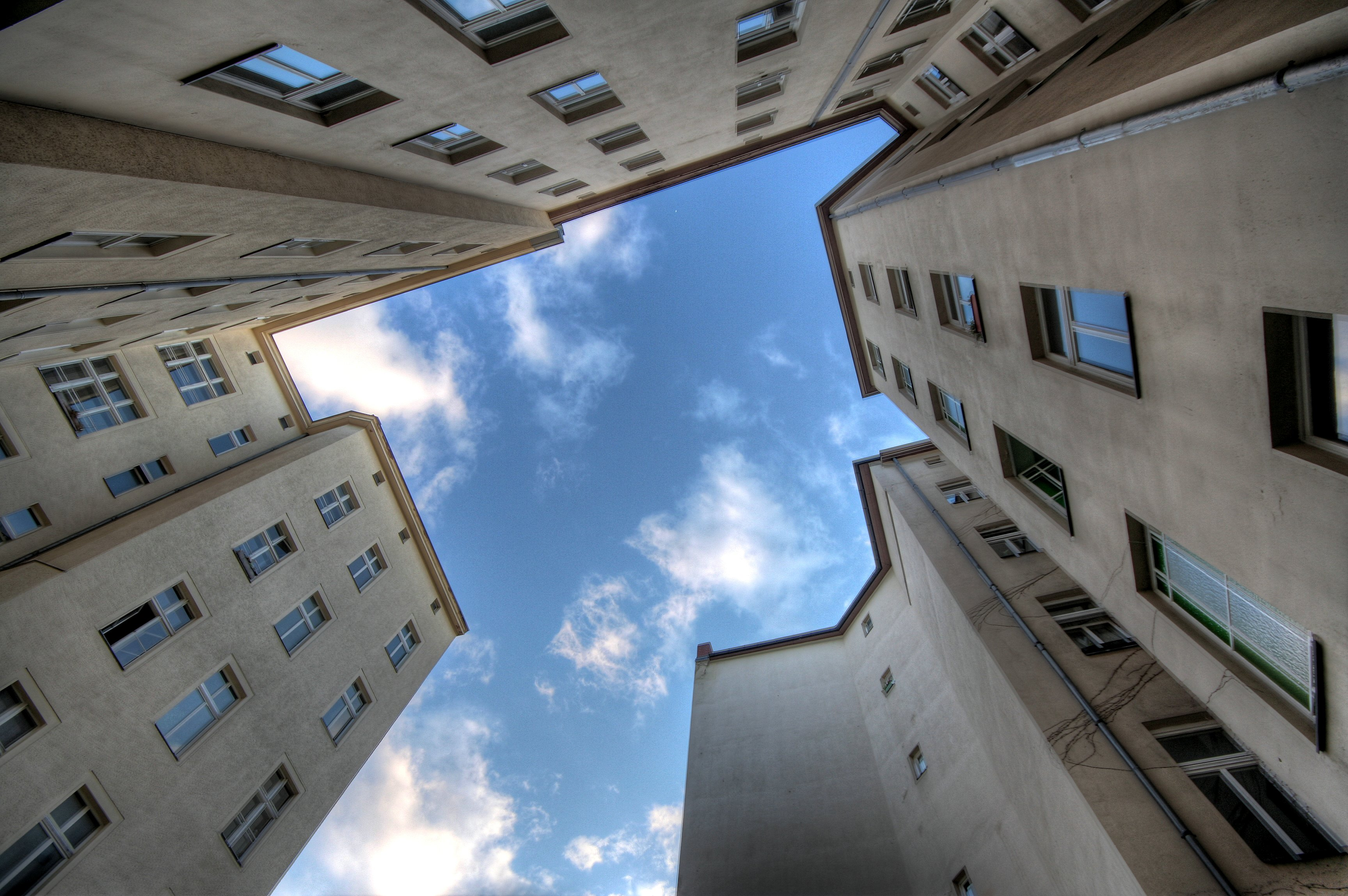 this is where I live. Bewusster Verstoß gegen die Figur-Grund-Beziehung ;-)